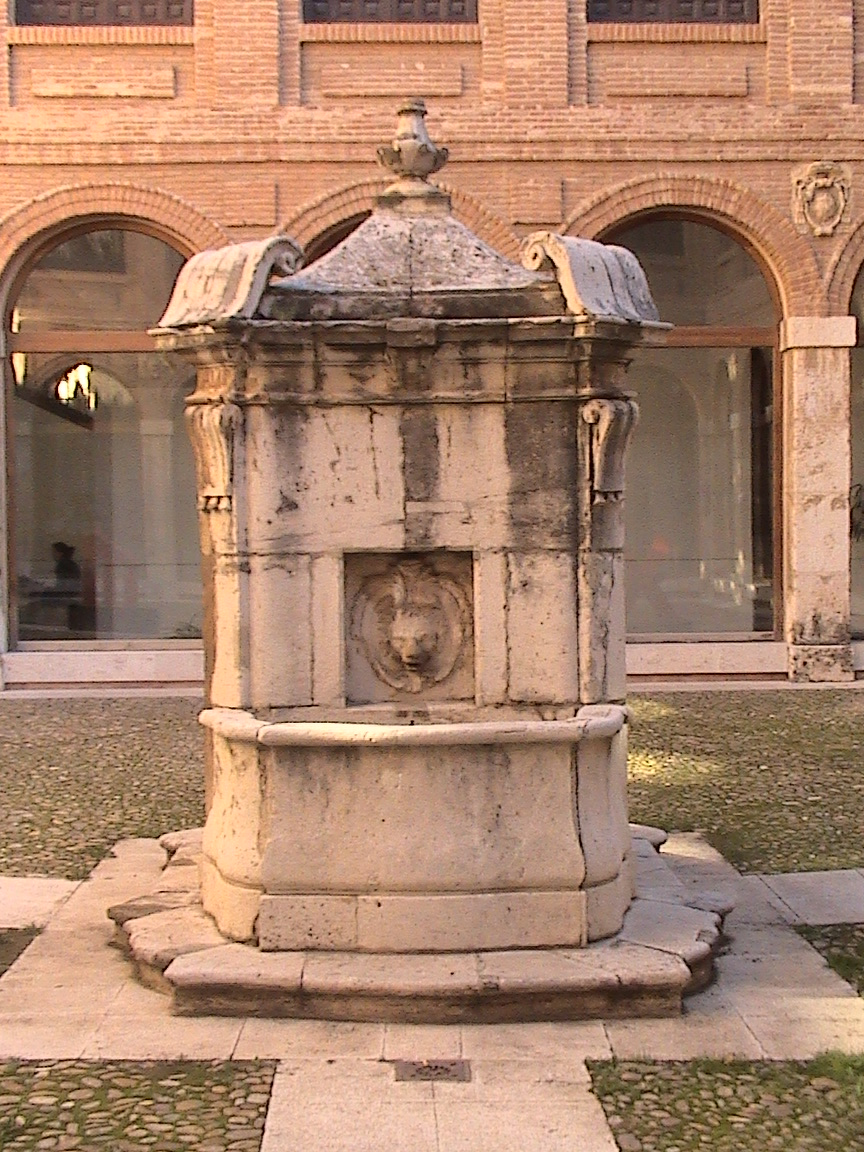 Pozo con la fuente de la boca de león, en uno de los patios del Colegio de Málaga de la Universidad de Alcalá (España). Es una fuente barroca diseñada por Miguel de Arteaga, y construida en piedra en 1769.